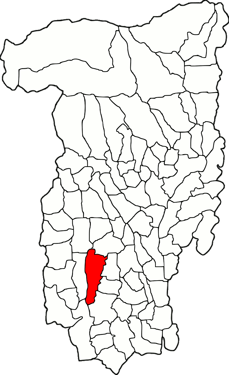 Lage der Gemeinde Fârtățești im Kreis Vâlcea (RO).